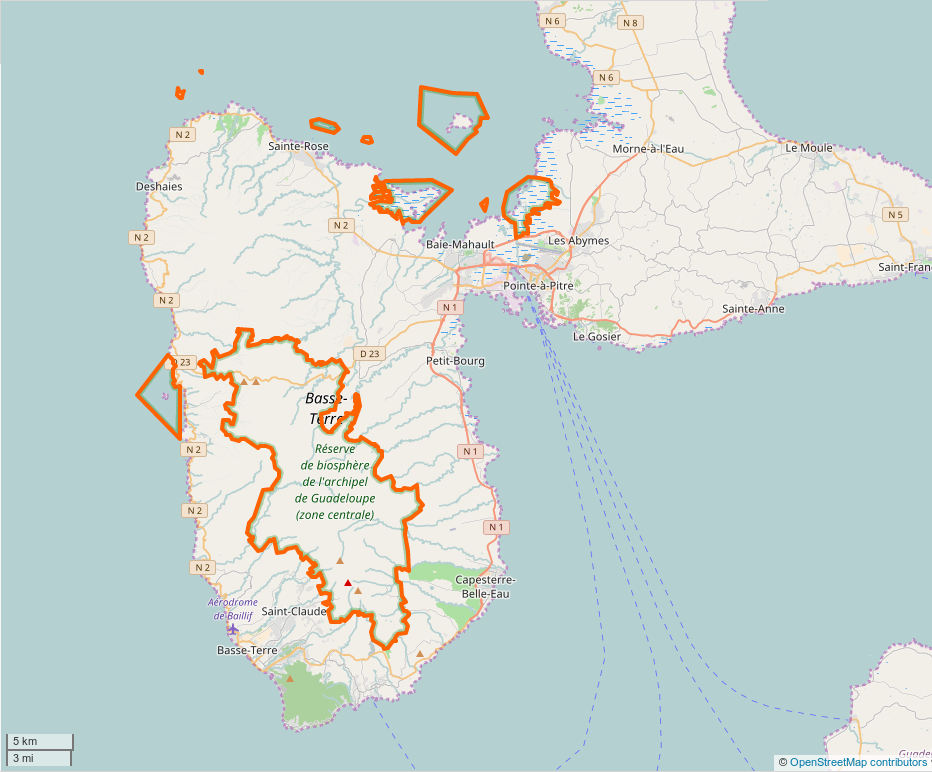 Périmètre du coeur de parc du Parc national de la Guadeloupe.